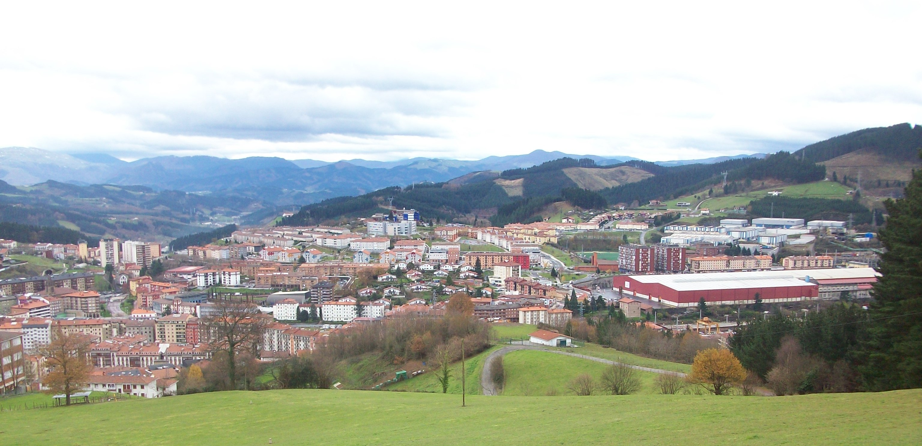 Zumarragaren ikuspegia. Gipuzkoa, Euskal Herria.